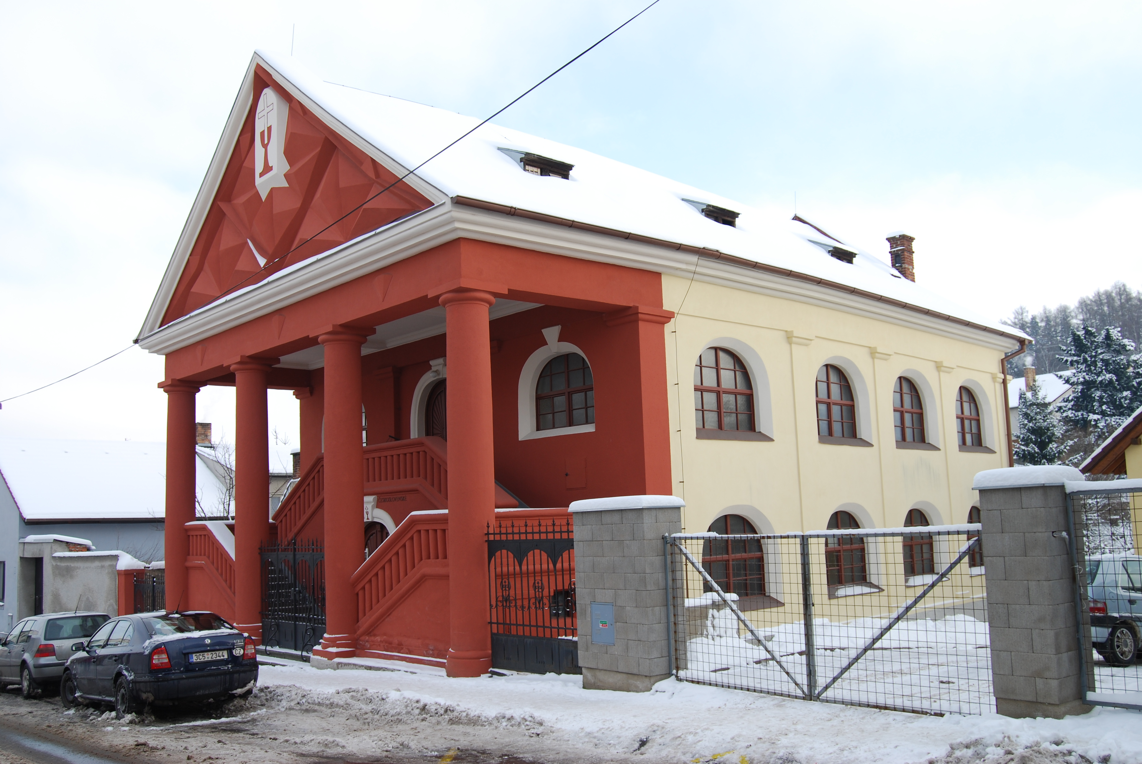 Nová synagoga v Sokolovské ulici. Milevsko. Okres Písek. Česká republika.